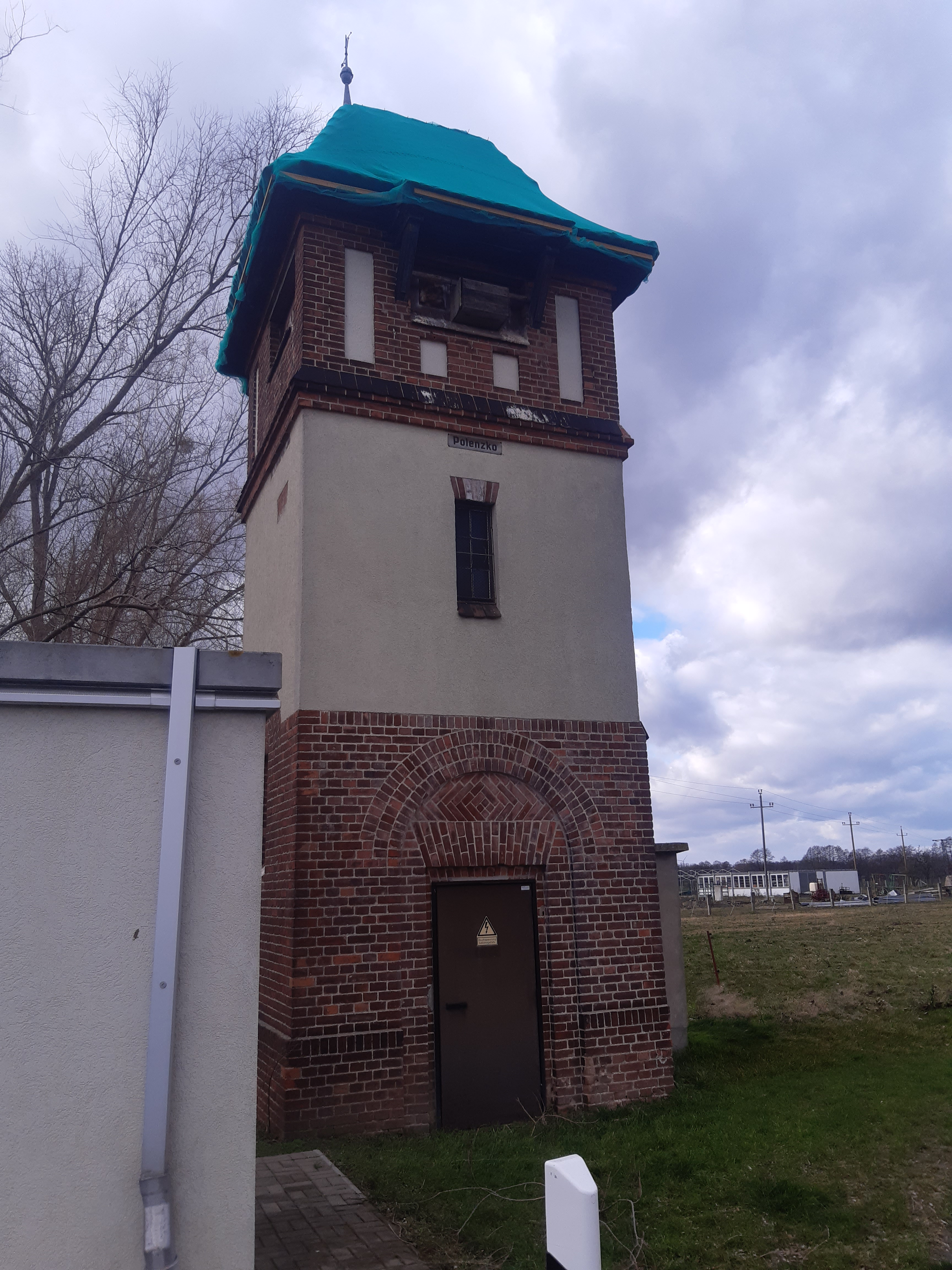 Trafo